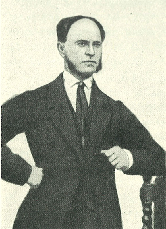 Grunnleggeren av Grimstad Adressetidende, J.P. Nielsen